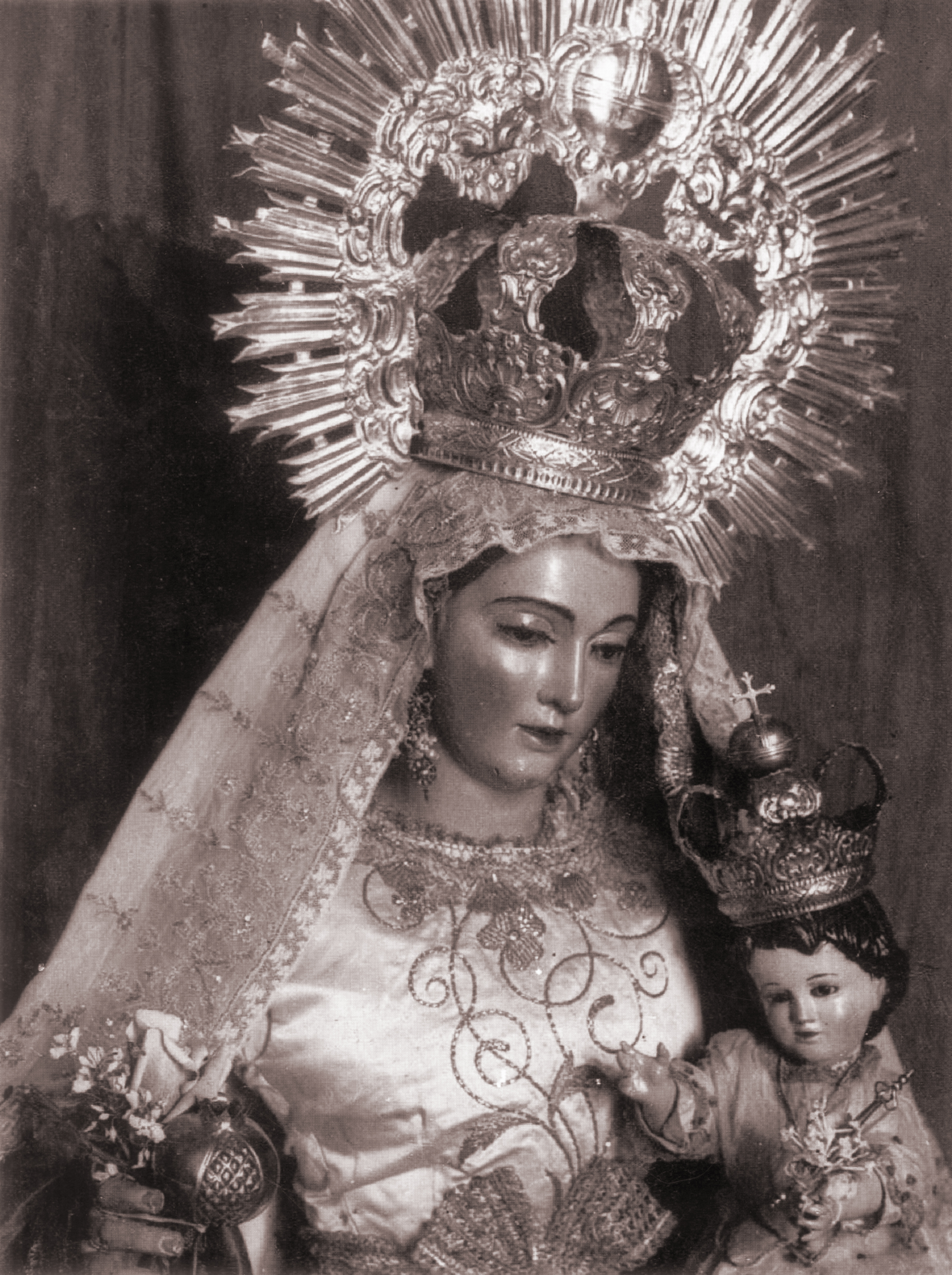 Fotografía blanco y negro de Ntra. Sra. de la Granada Coronada de Guillena